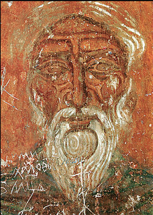 Свяшчэннамучанік Кіпрыян, епіскап Карфагенскі. Фрэска на паўночнай сцяне Спаса-Праабражэнскай царквы.